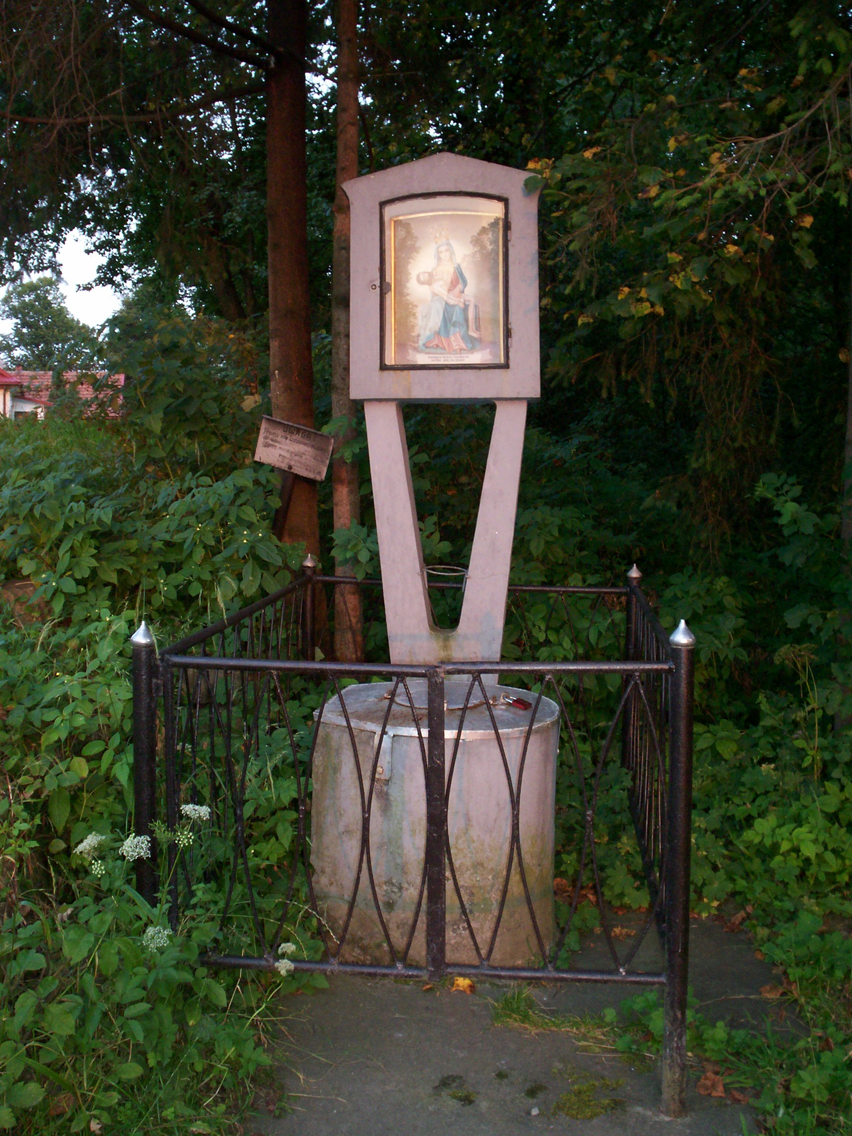 Cudowne źródełko w Limanowej.